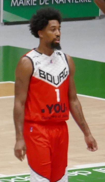 Chase Simon